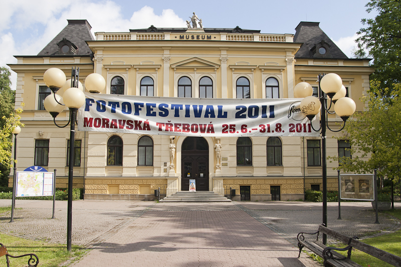 Muzeum Moravska Trebova